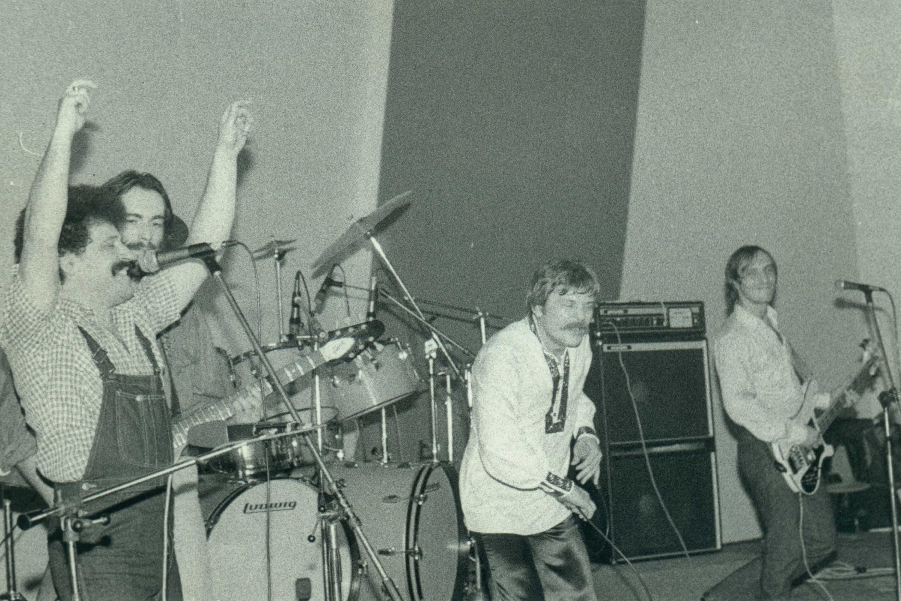 Želimir Altarac Čičak sa članovima grupe Indexi tokom njihovog nastupa na Prvom rock maratonu u Domu maldih u Sarajevu 18. 1. 1979. godine.